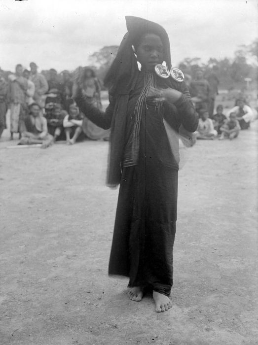 Negatief. Batak adatdanseres